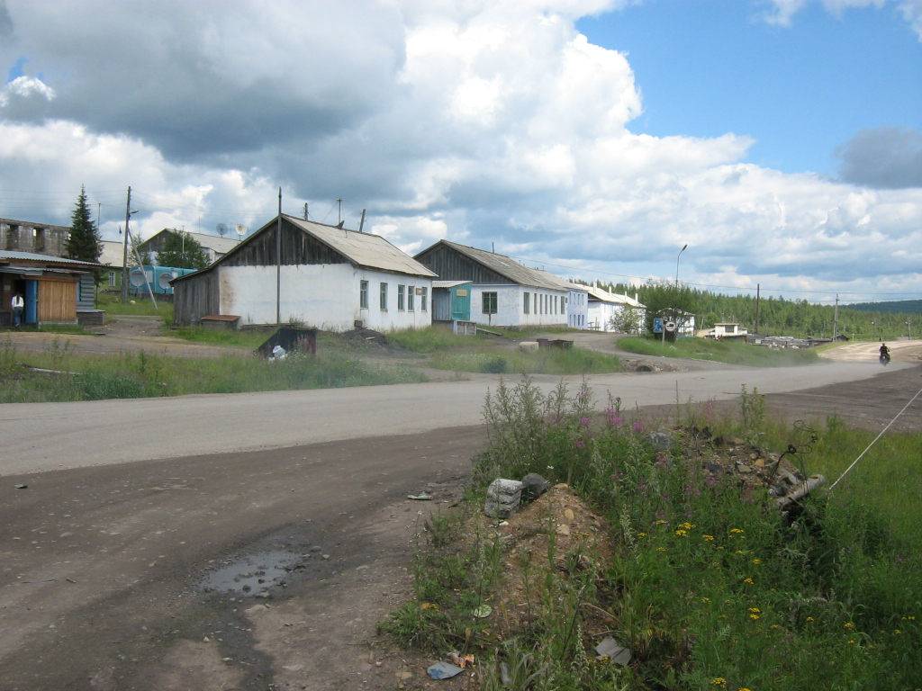 п. Б. Нимныр